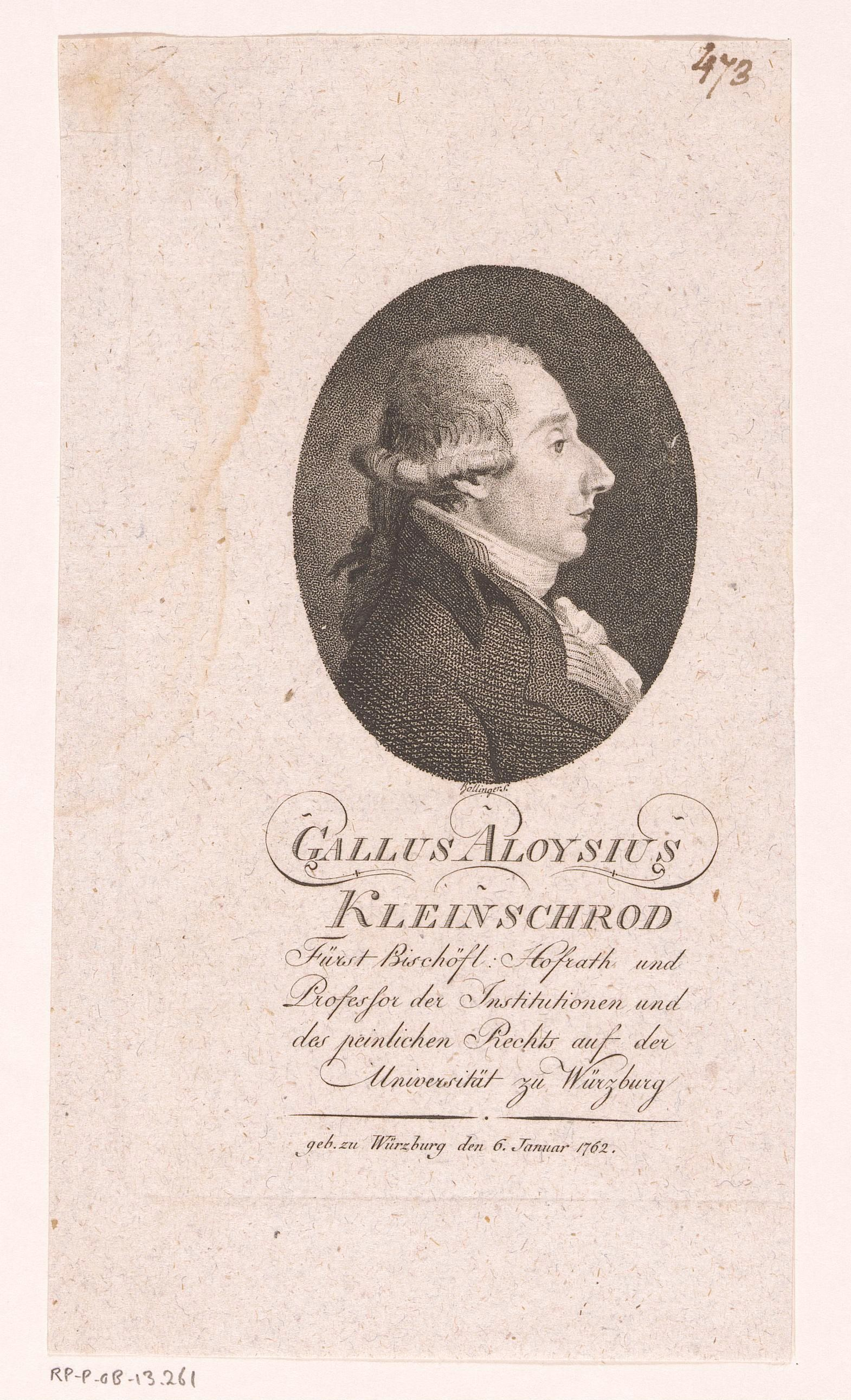 IdentificatieTitel(s): Portret van Gallus Aloysius KleinschrodObjecttype: prent Objectnummer: RP-P-OB-13.261Catalogusreferentie: HAB A 11087Opschriften / Merken: verzamelaarsmerk, verso, gestempeld: Lugt 2228VervaardigingVervaardiger: prentmaker: Friedrich Wilhelm Bollinger (vermeld op object)Plaats vervaardiging: BerlijnDatering: 1787 - 1825Materiaal: papier Techniek: stippelwerkAfmetingen: blad: h 192 mm × b 108 mm (binnen de plaatrand afgesneden)OnderwerpWat: historical personsWie: Gallus Aloysius Caspar KleinschrodVerwerving en rechtenVerwerving: onbekend 2006Copyright: Publiek domein